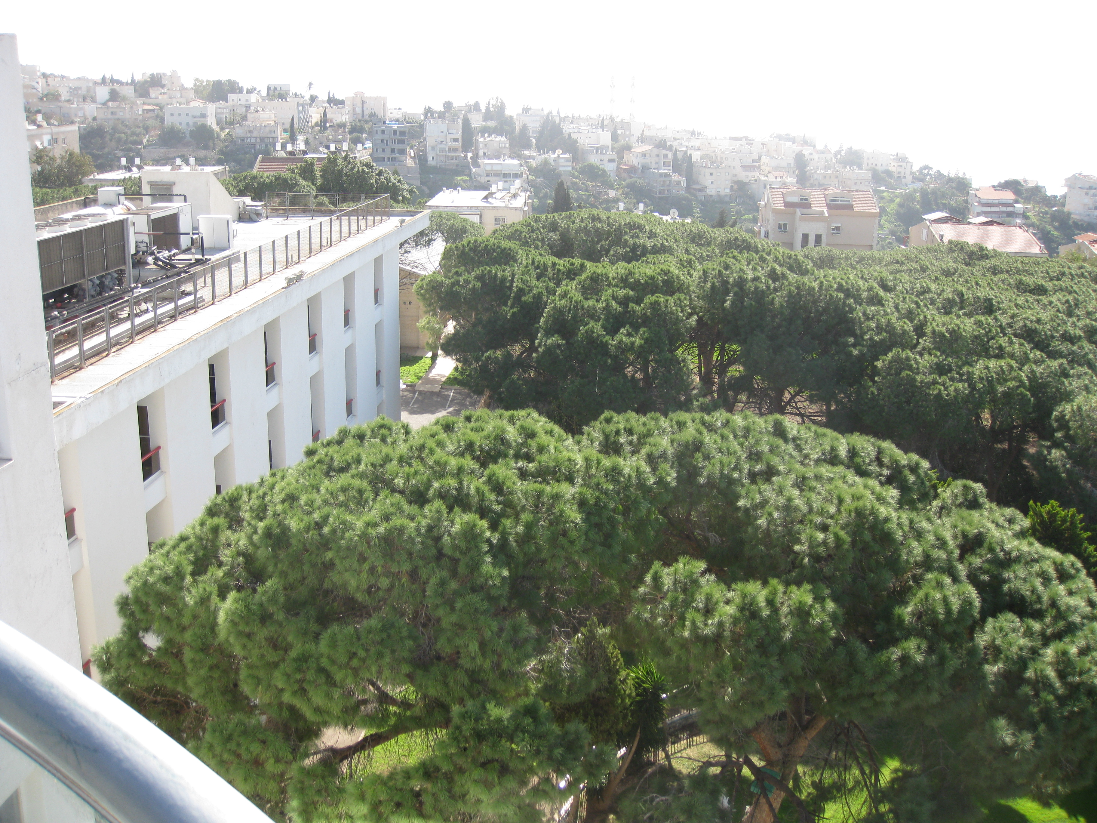 Har HaCarmel Hotel מלון הר הכרמל